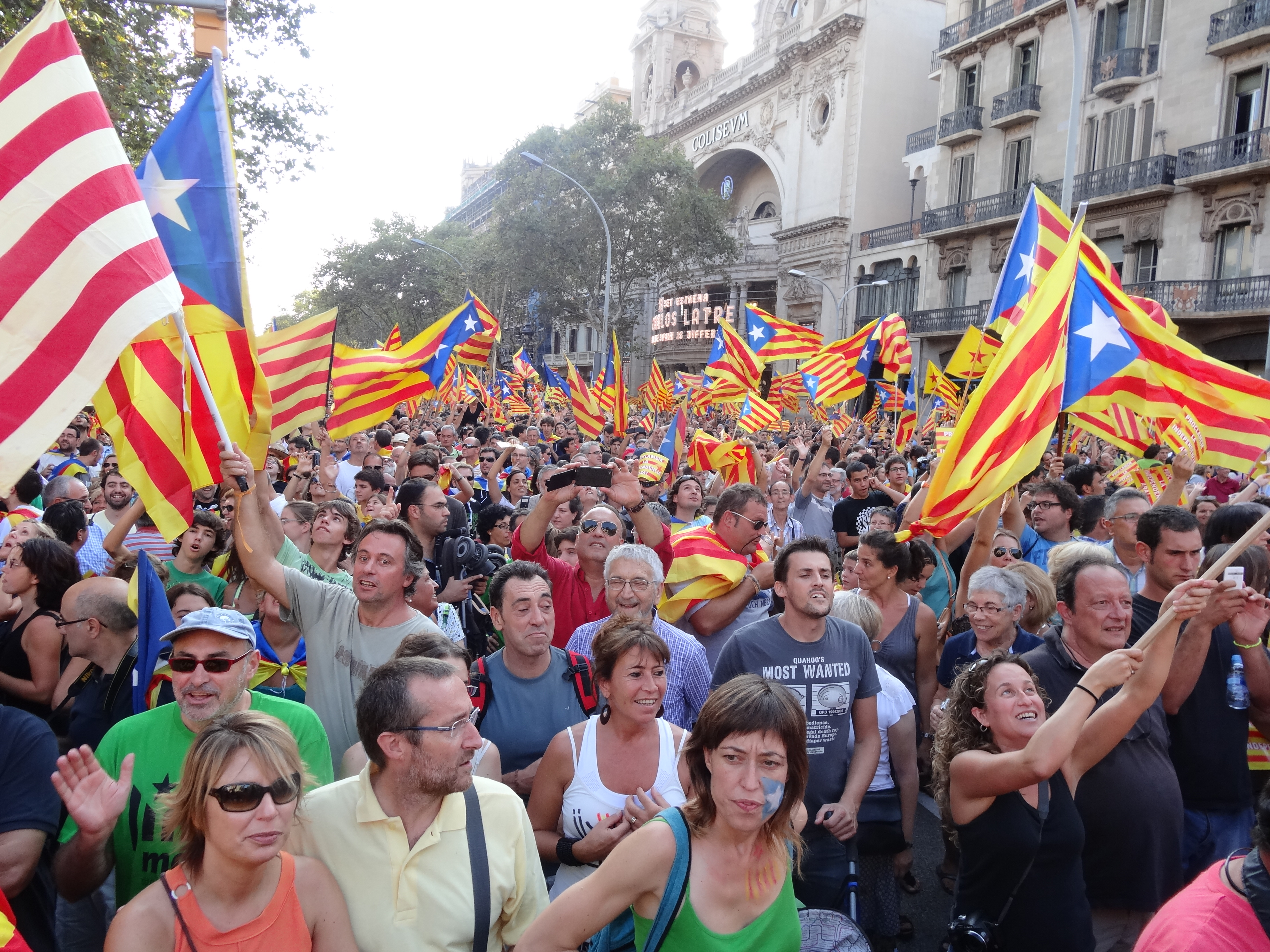 Manifestació ANC en la Diada Nacional de Catalunya, 11 de setembre a Barcelona (setembre 2012)